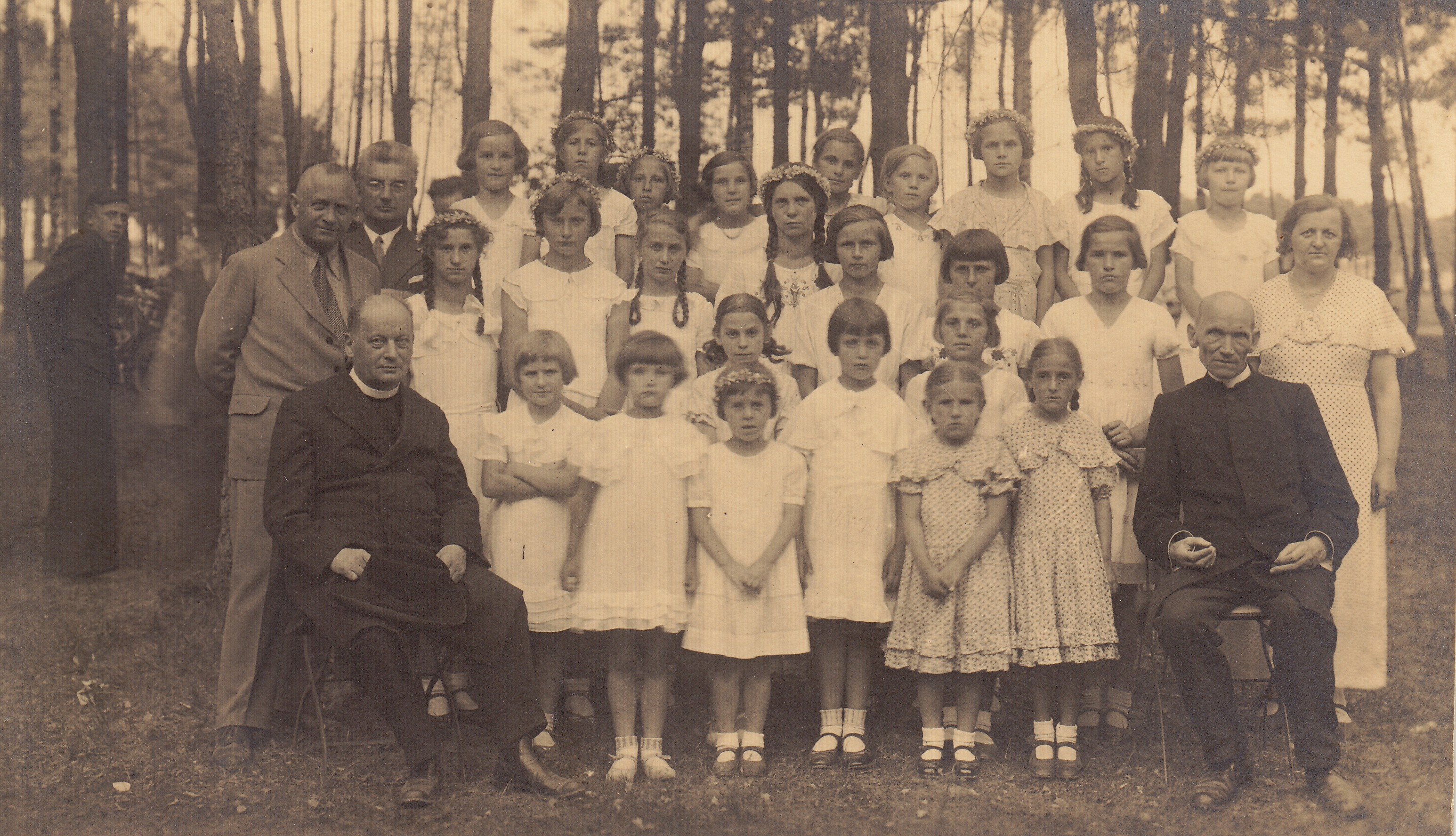 Od lewej stoją: w jasnym garniturze Józef Mozolewski (inspektor szkolny) i w okularach Juliusz Zieliński (nauczyciel, dyrektor szkoły polskiej w Złotowie), siedzi ks. Bolesław Domański (prezes V Dzielnicy Związku Polaków w Niemczech); dalej stoją uczennice tej szkoły ze swoją nauczycielką Marią Zientara-Malewską (ostatnia z prawej), obok niej siedzi ks. Maksymilian Grochowski (działacz Związku Polaków w Niemczech).